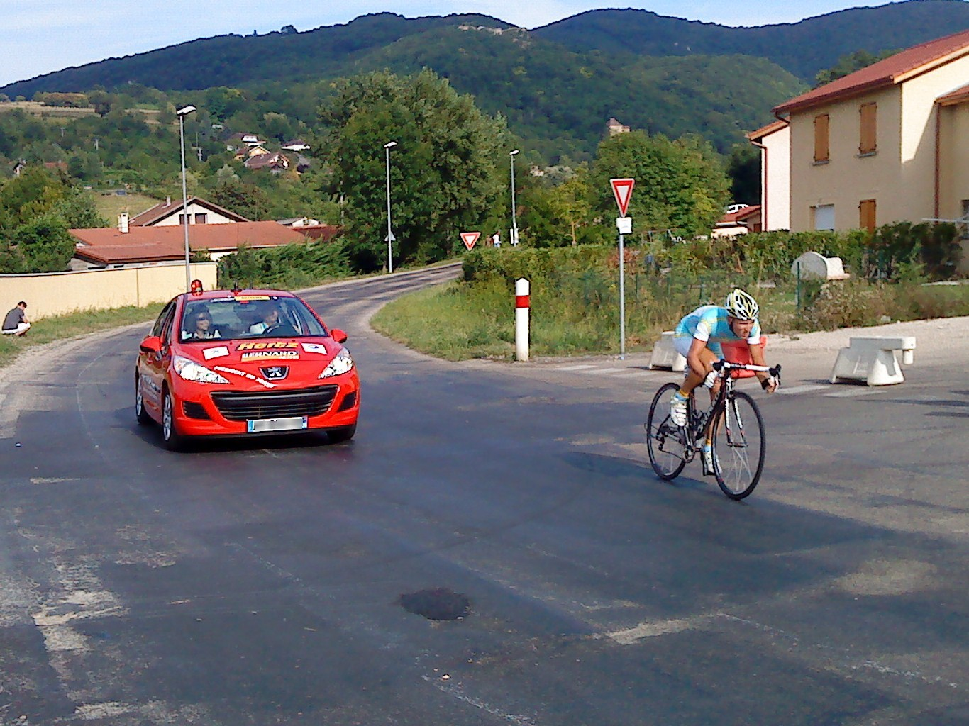 Roman Zhiyentayev lors du prologue du Tour de l'Ain 2010